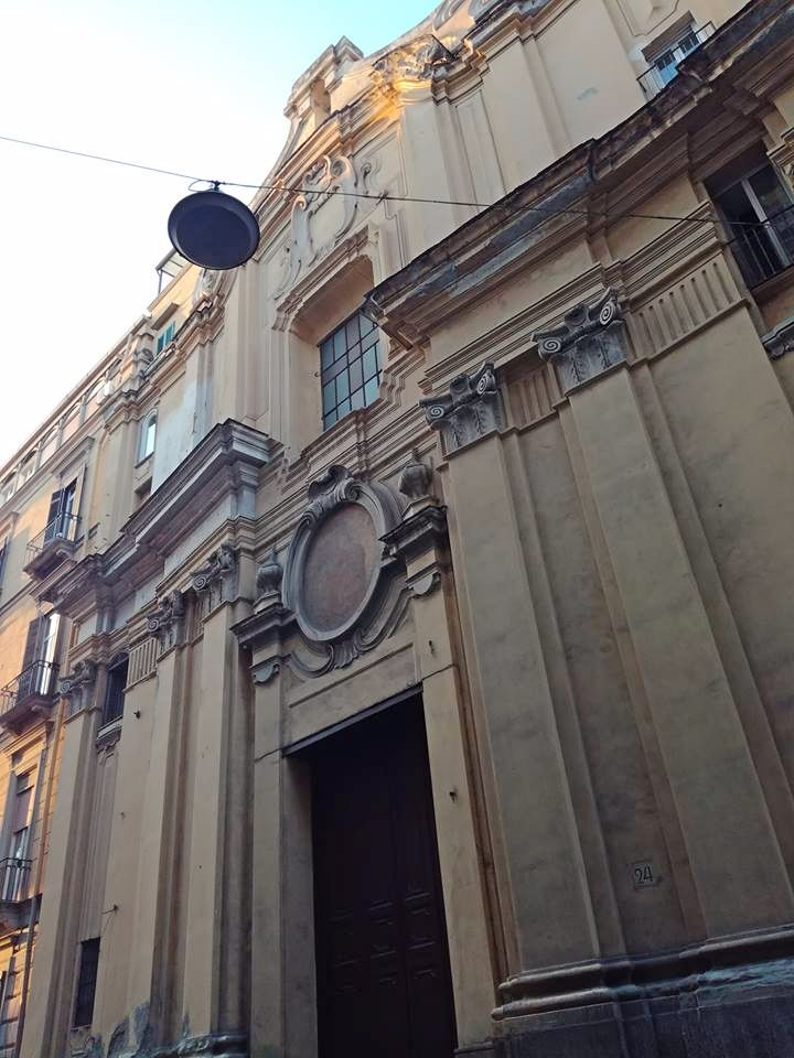 La facciata